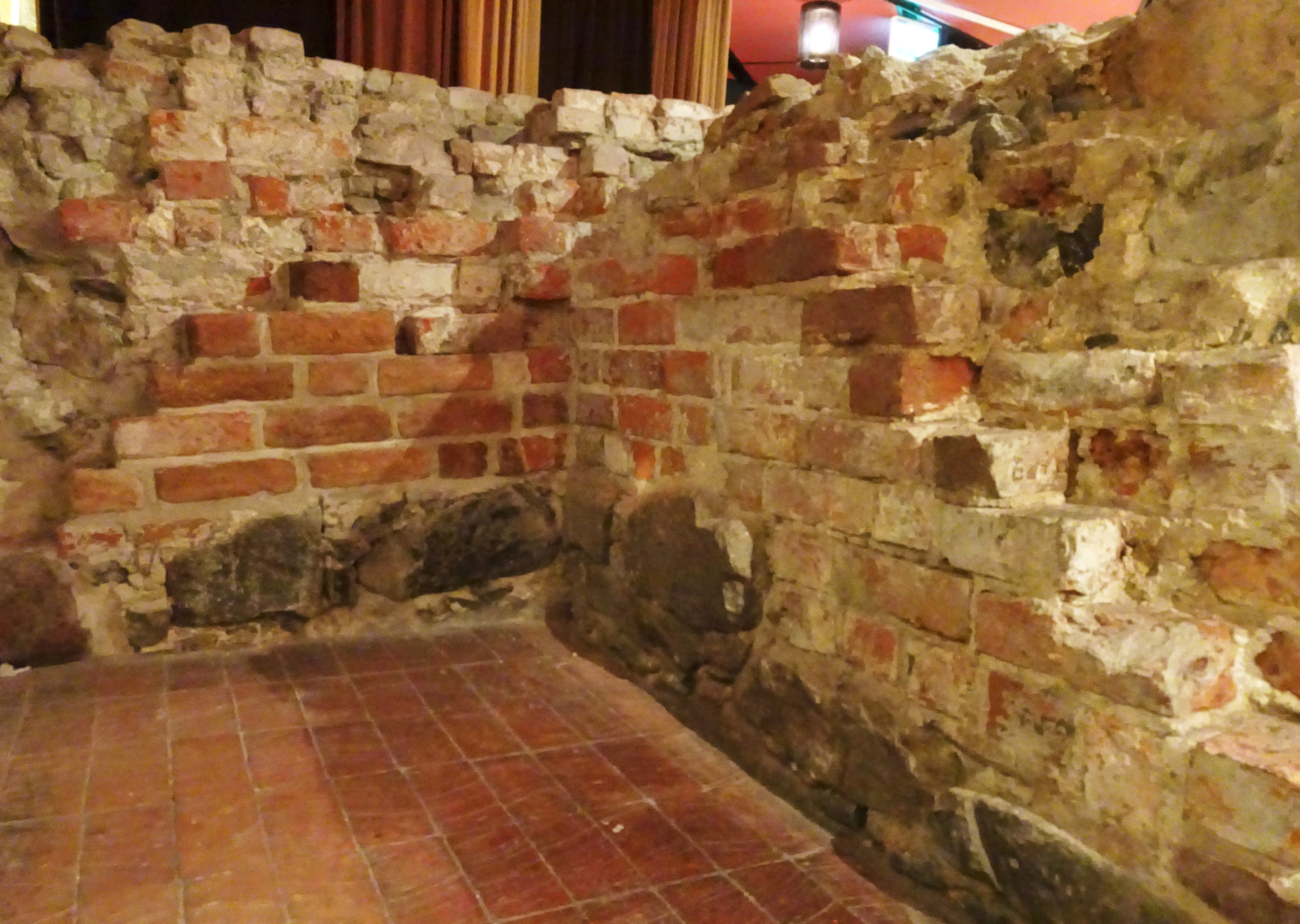 Lejontornet i Victory Hotels matsal, Lilla Nygatan 5